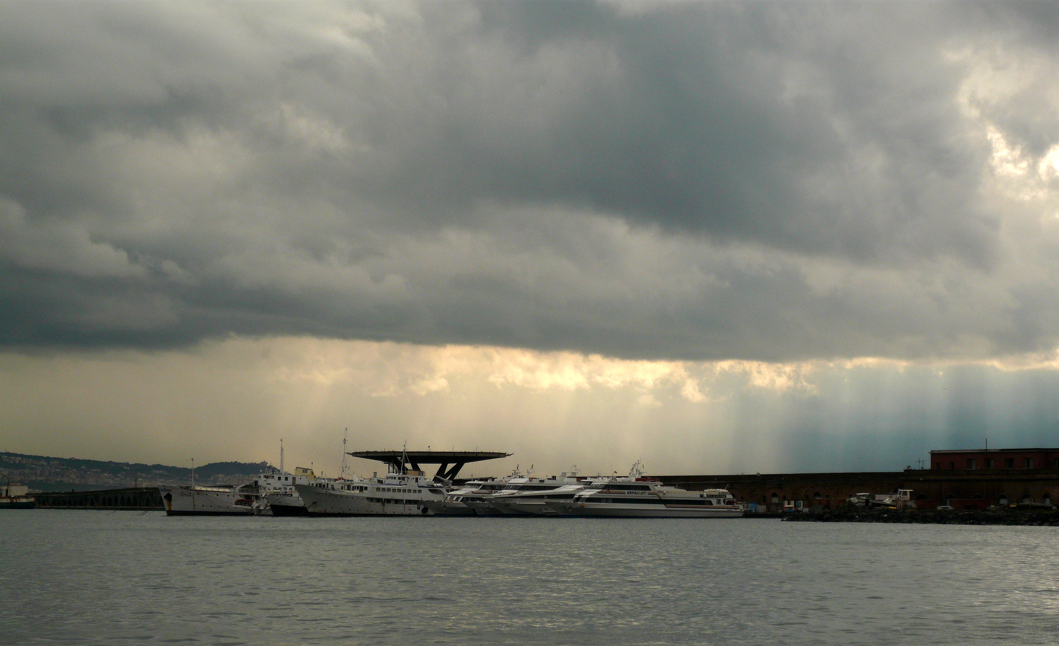 Raggi di sole sul Golfo di Napoli visti dal Molo Beverello. Autore foto: Roberto De Martino